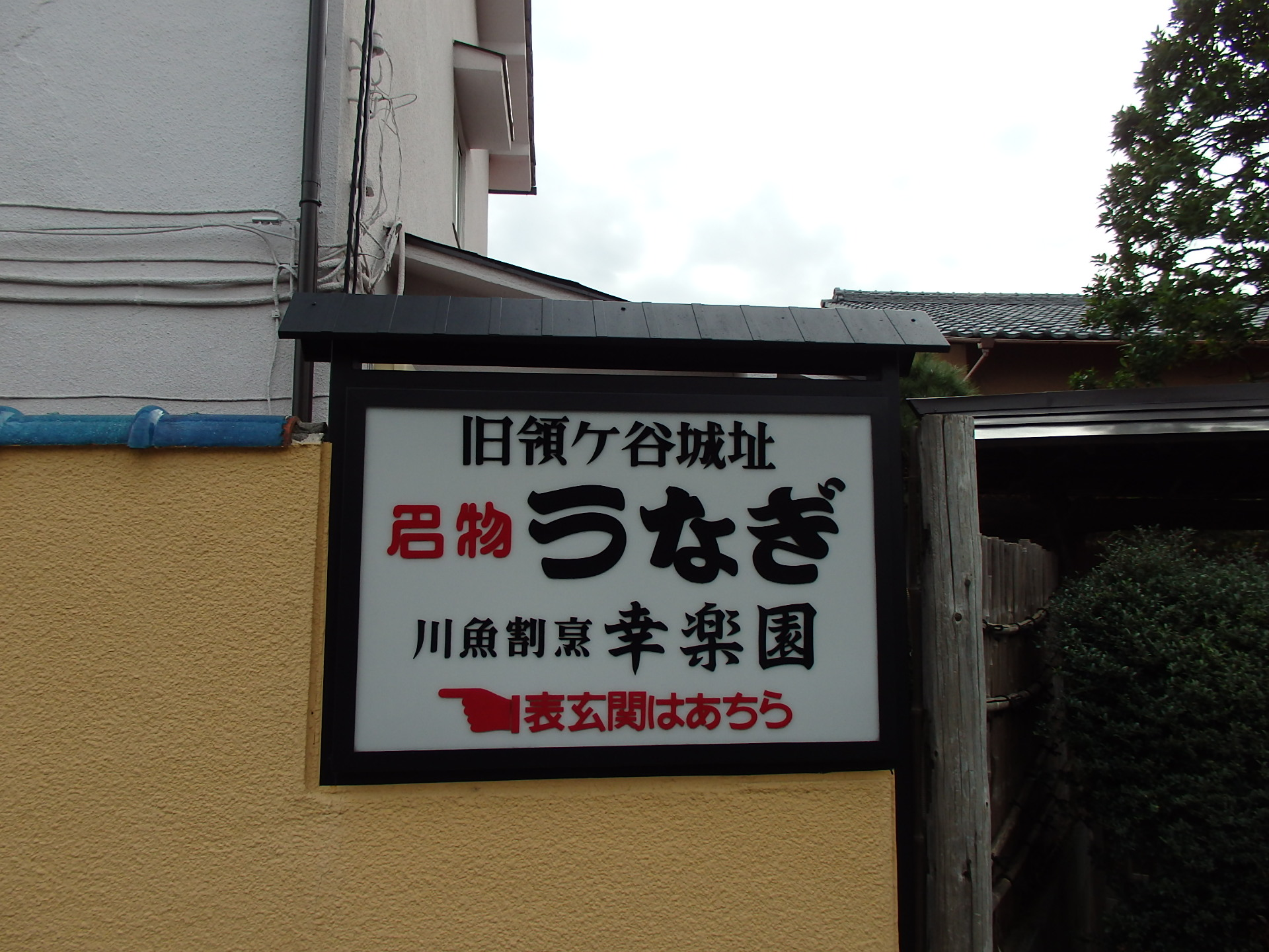 領ヶ谷城址